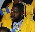 Делегация Барбадоса на открытии Летних Олимпийских игр 2016 в Рио-де-Жанейро